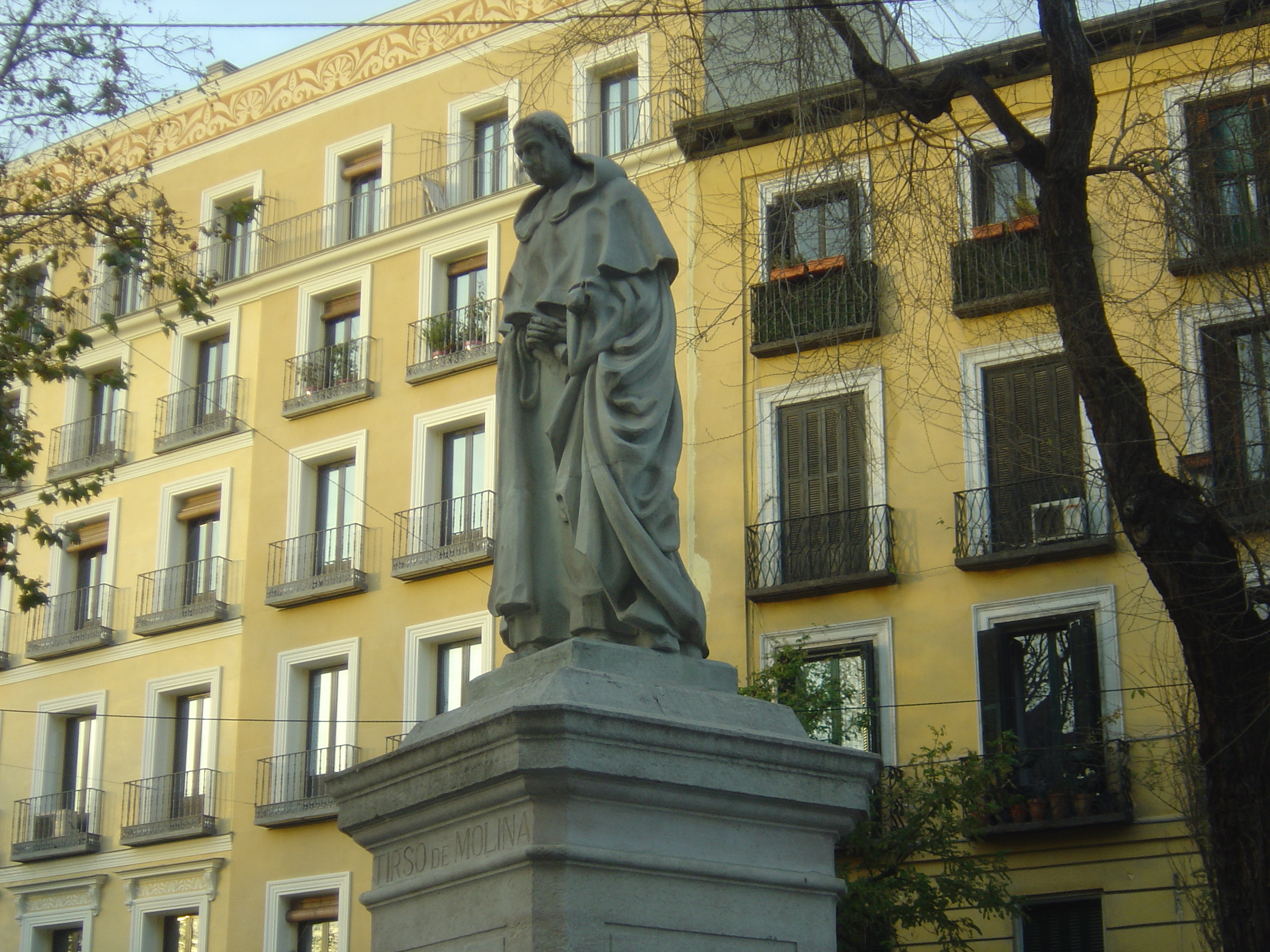 no original description